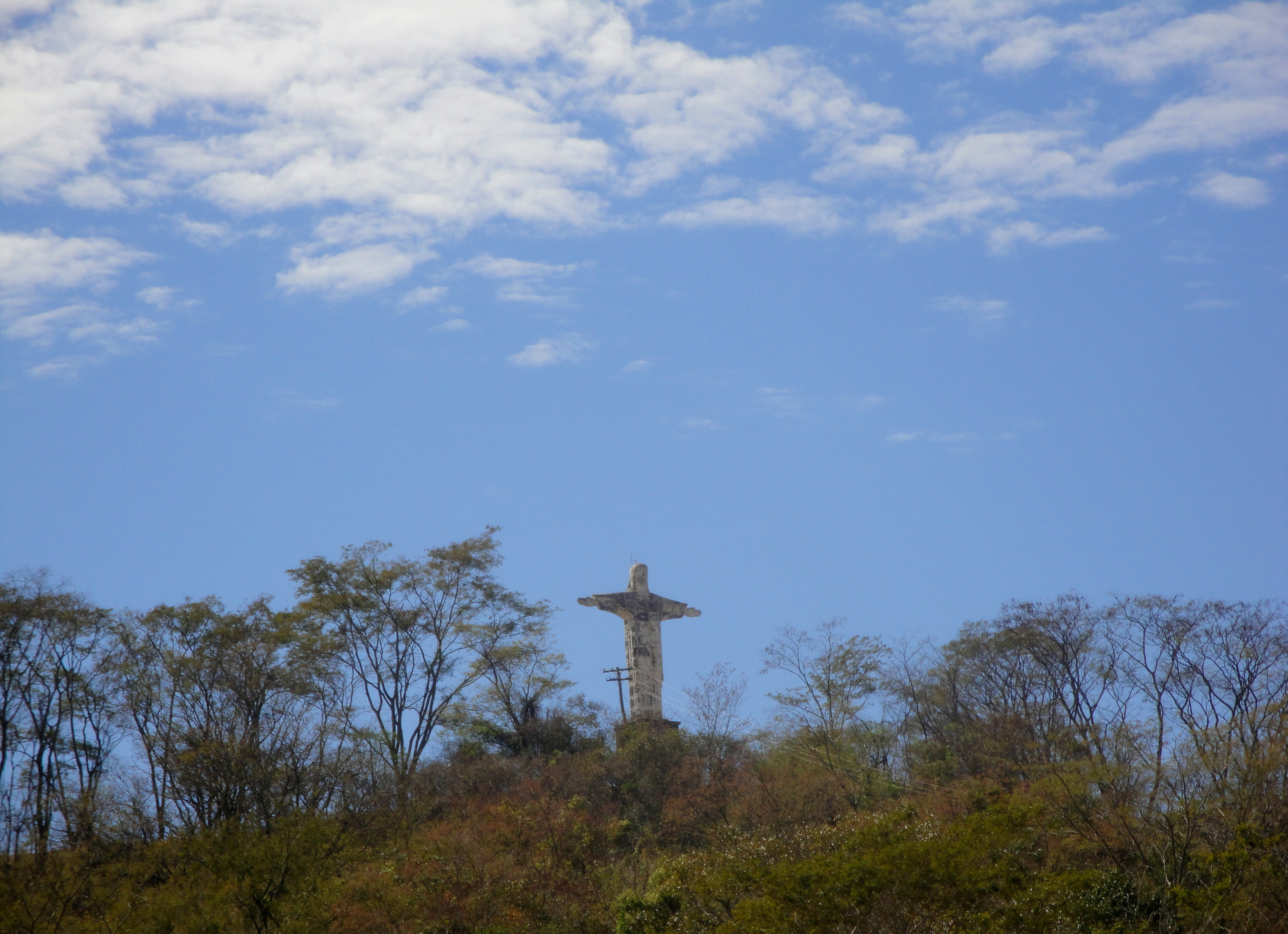 Cristo Redentor de Rincão no Morro do Cristo. Em geologia, este morro é denominado de Morro Testemunho e está assentado em uma camada de basalto.